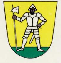 Wappen von Spiringen Kanton Uri Schweiz